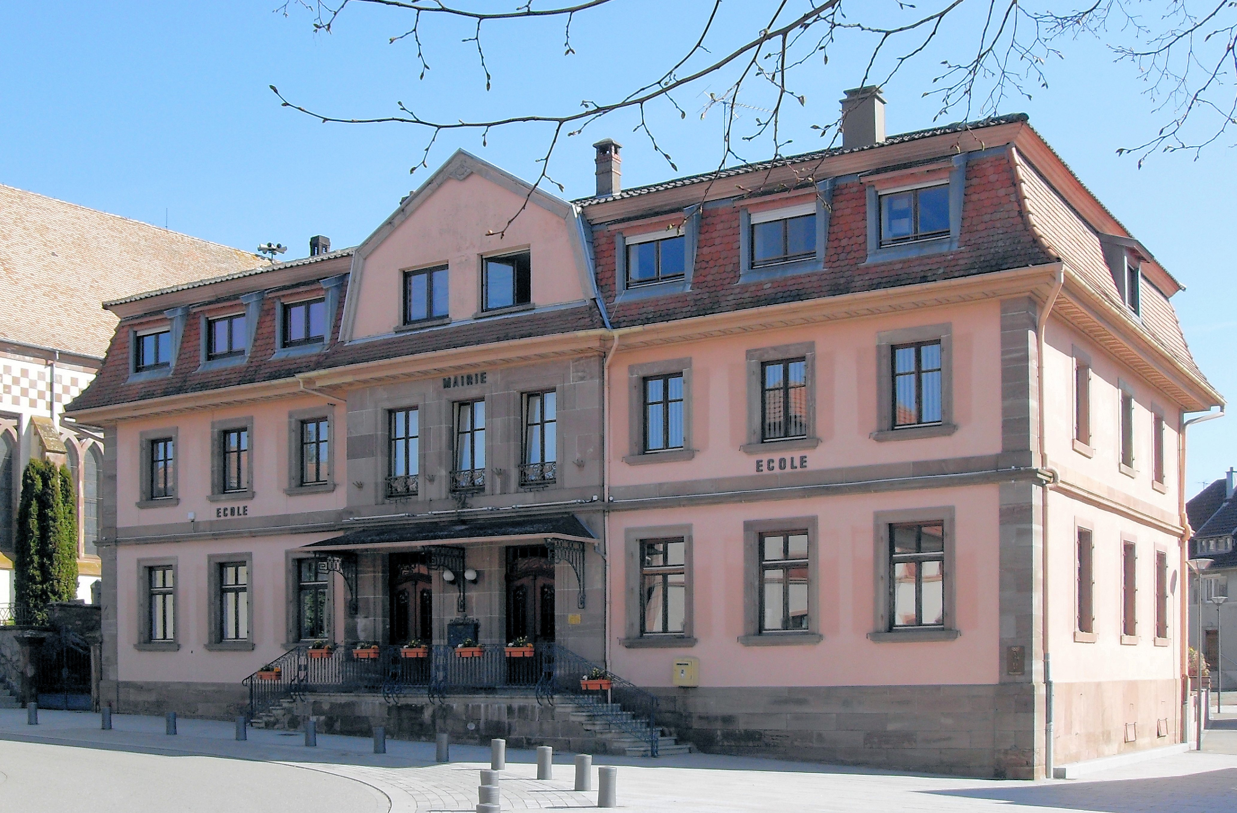 La mairie-école de Burnhaupt-le-Bas